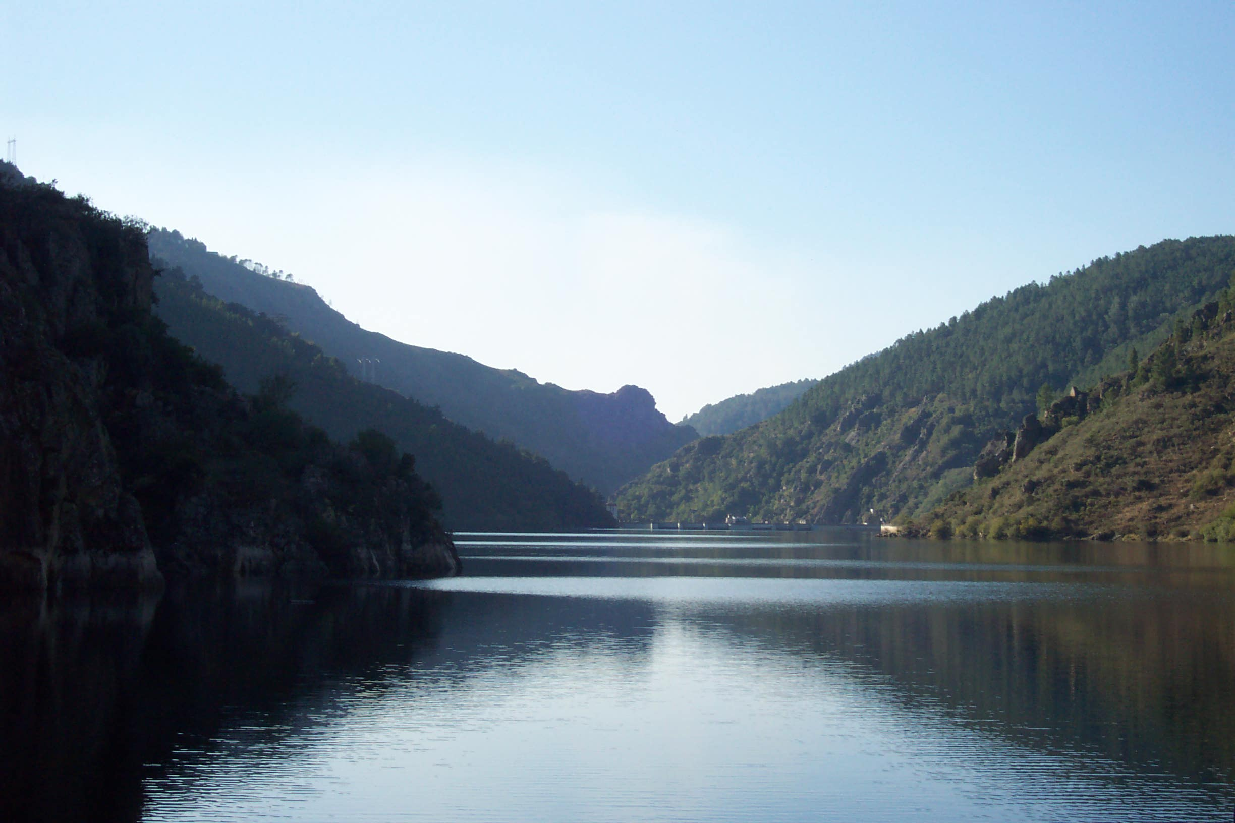 Foto do canon do sil, na Ribeira Sacra. Saqueina eu mesmo, no barco turístico, no vrán 2005. Imaxe dende o interior dos canons do Sil.